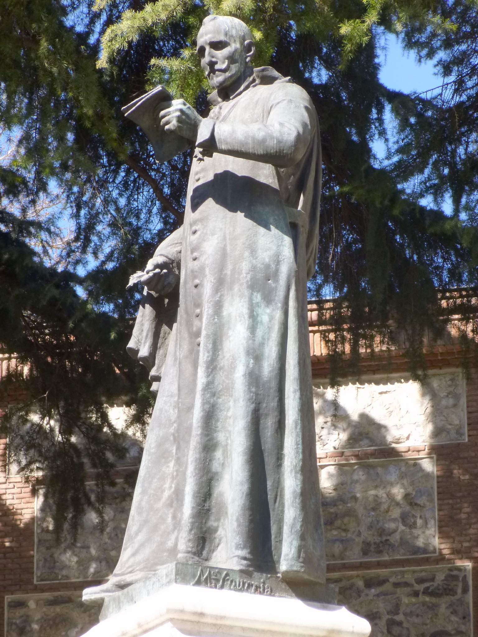 Madrid - Plaza de la Encarnación, Monumento a Lope de Vega